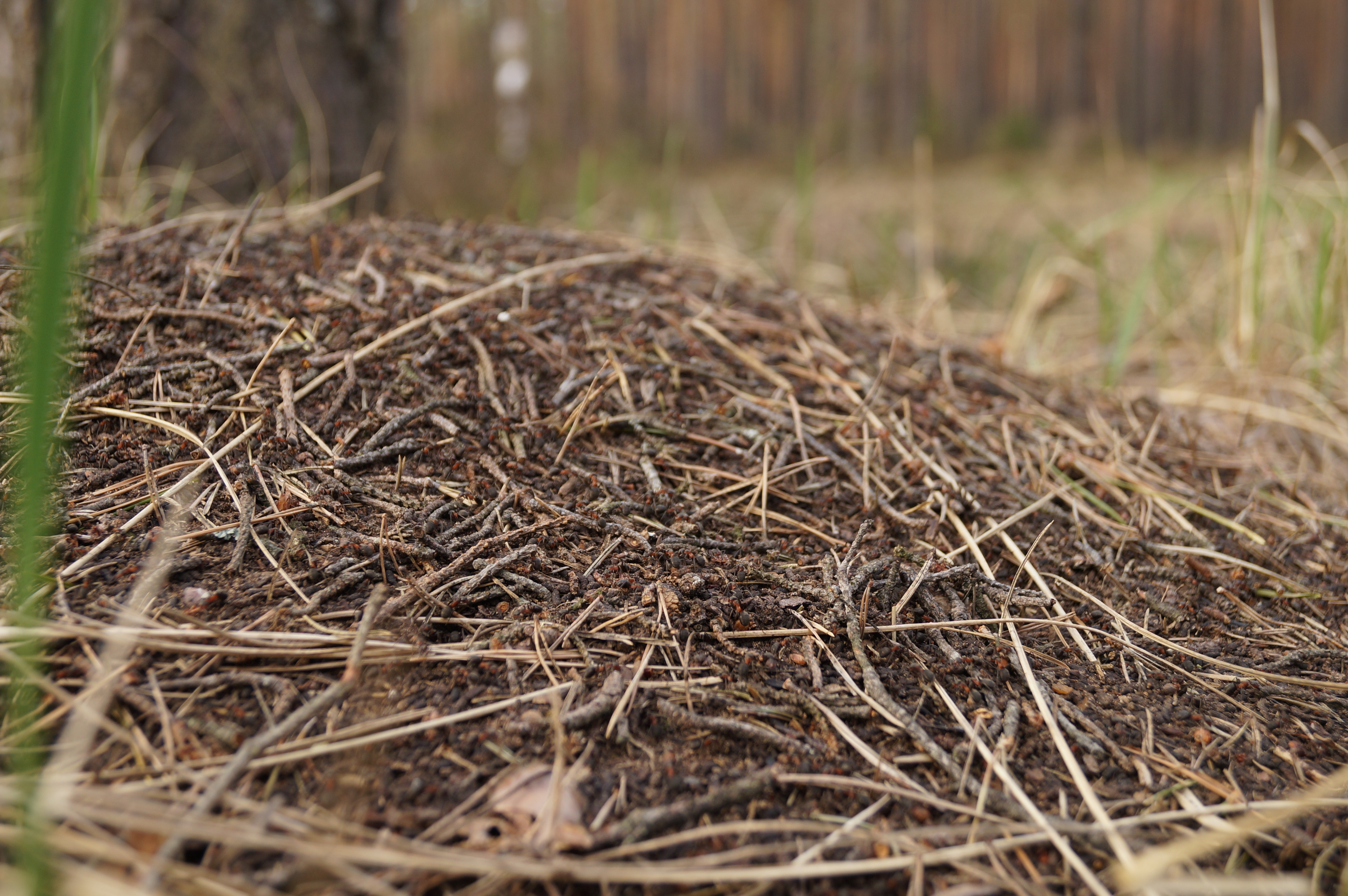 Мурашнік